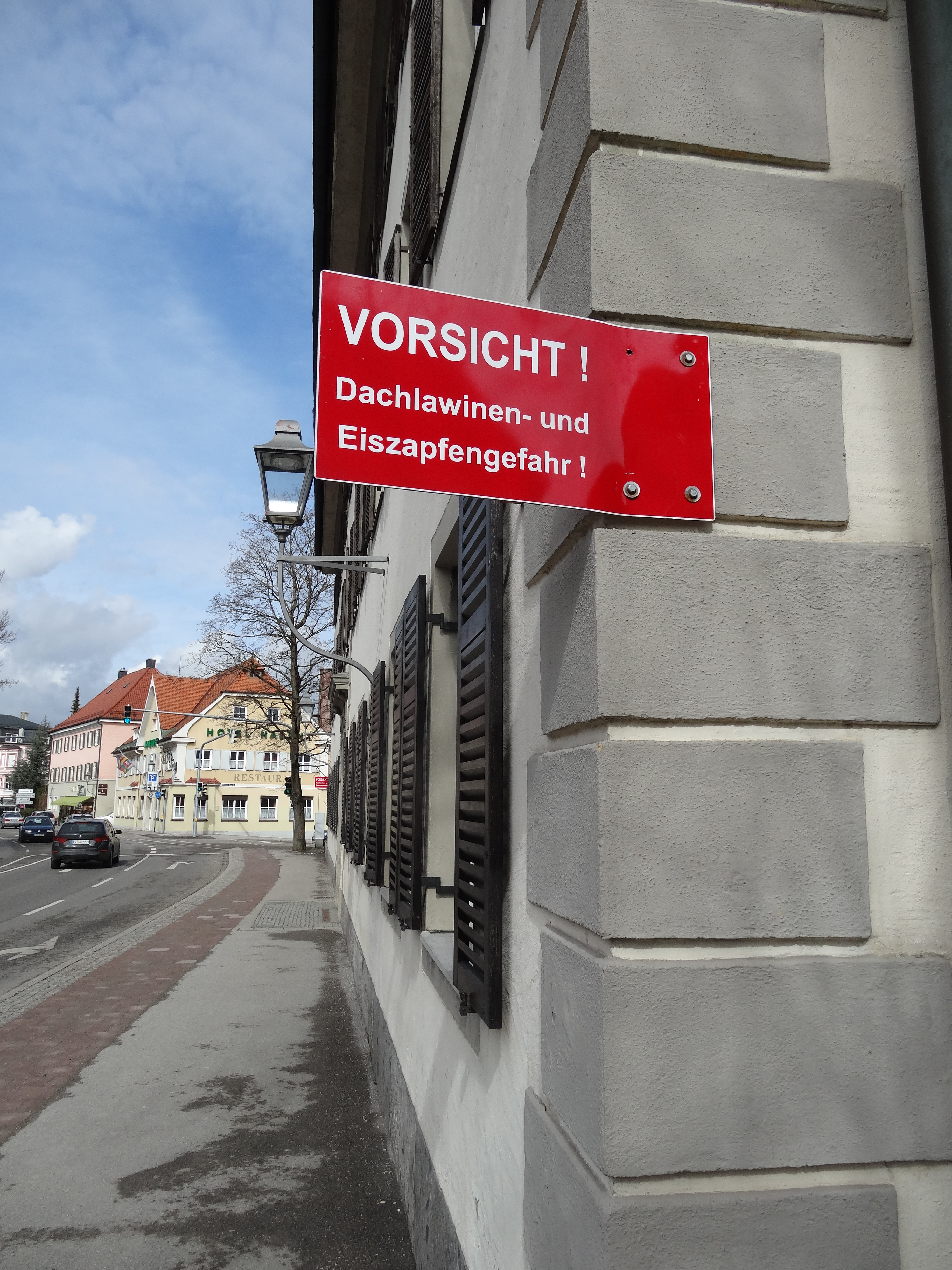 Warnung vor Dachlawinen am Amtsgericht in Kaufbeuren